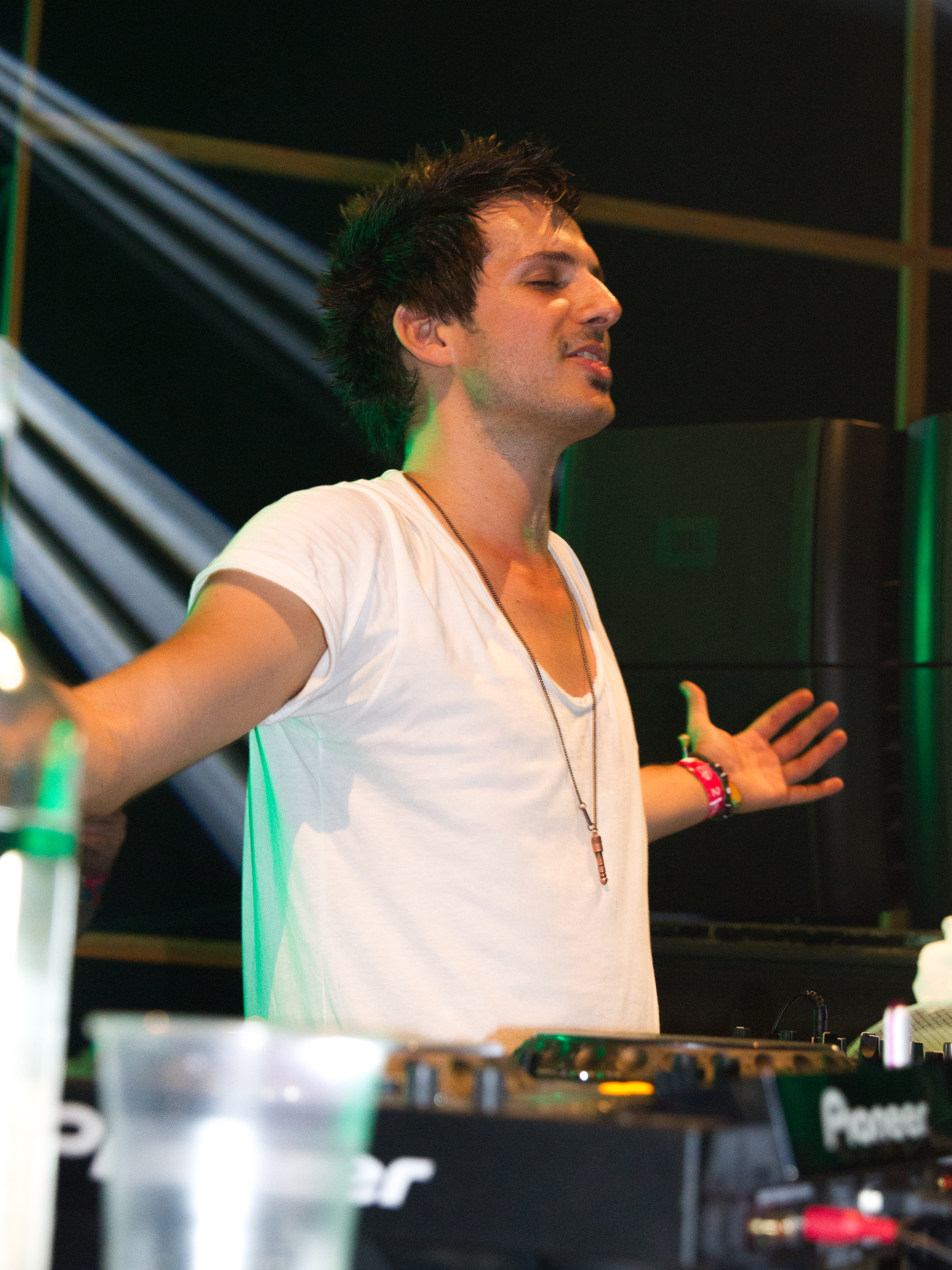 Code Black (Corey Soljan) beim 14. Airbeat-One Dance Festivals das vom 16. bis 19. Juli 2015 auf dem Flugplatz Neustadt-Glewe stattfand.